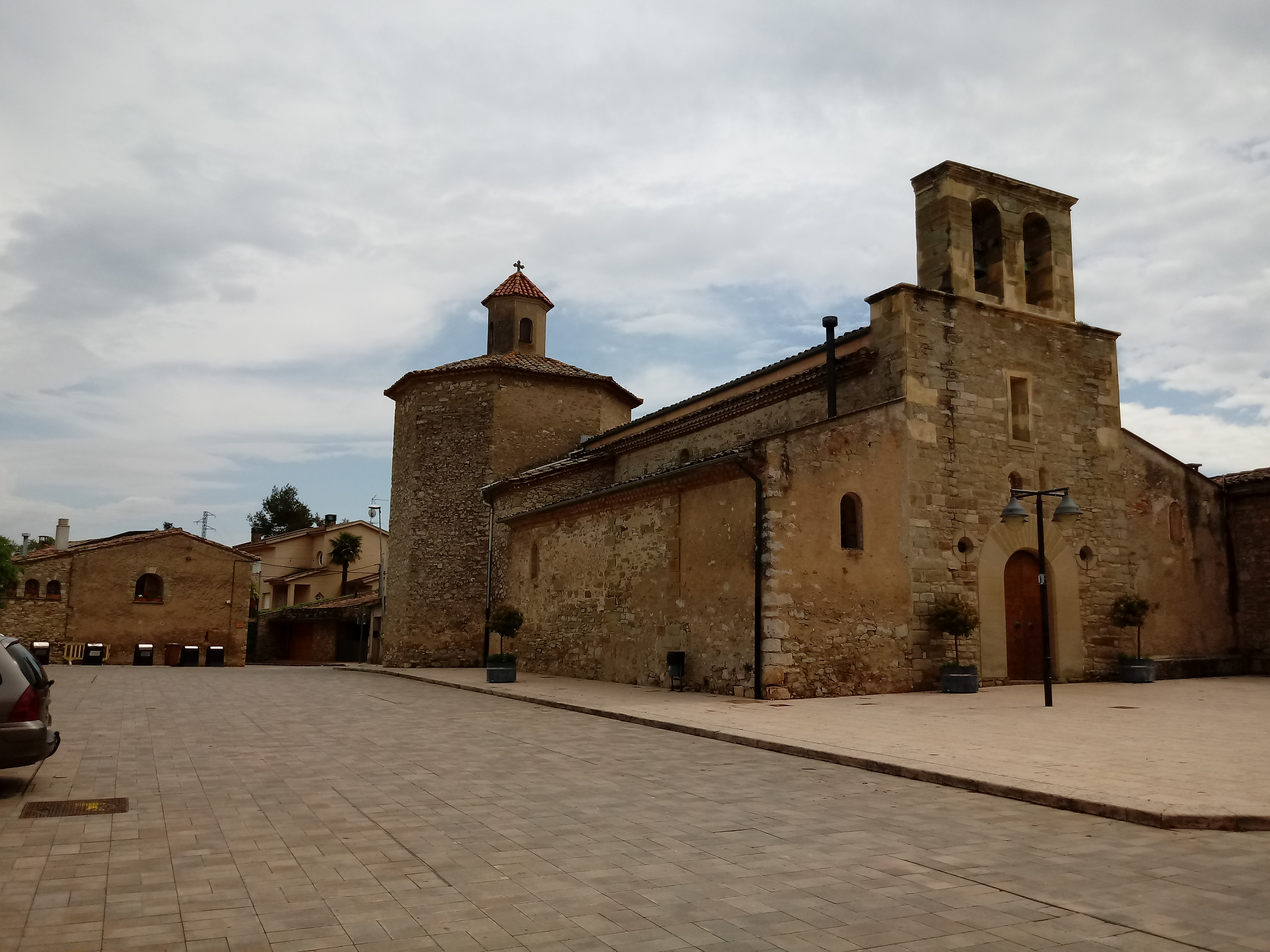 Iglesia de la población de Calders, en la comarca catalana del Moianés.